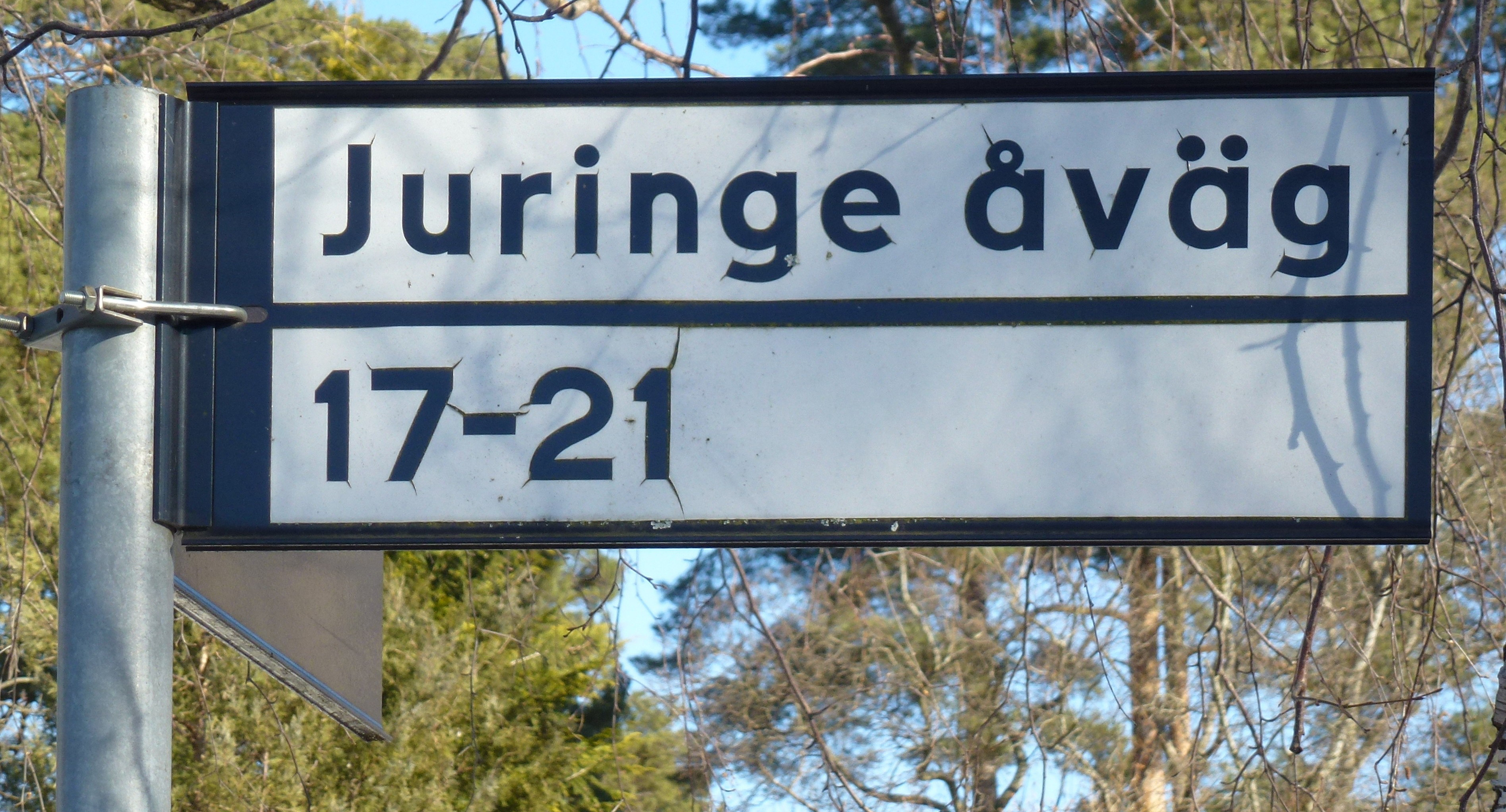 Juringe åväg i Segeltorp